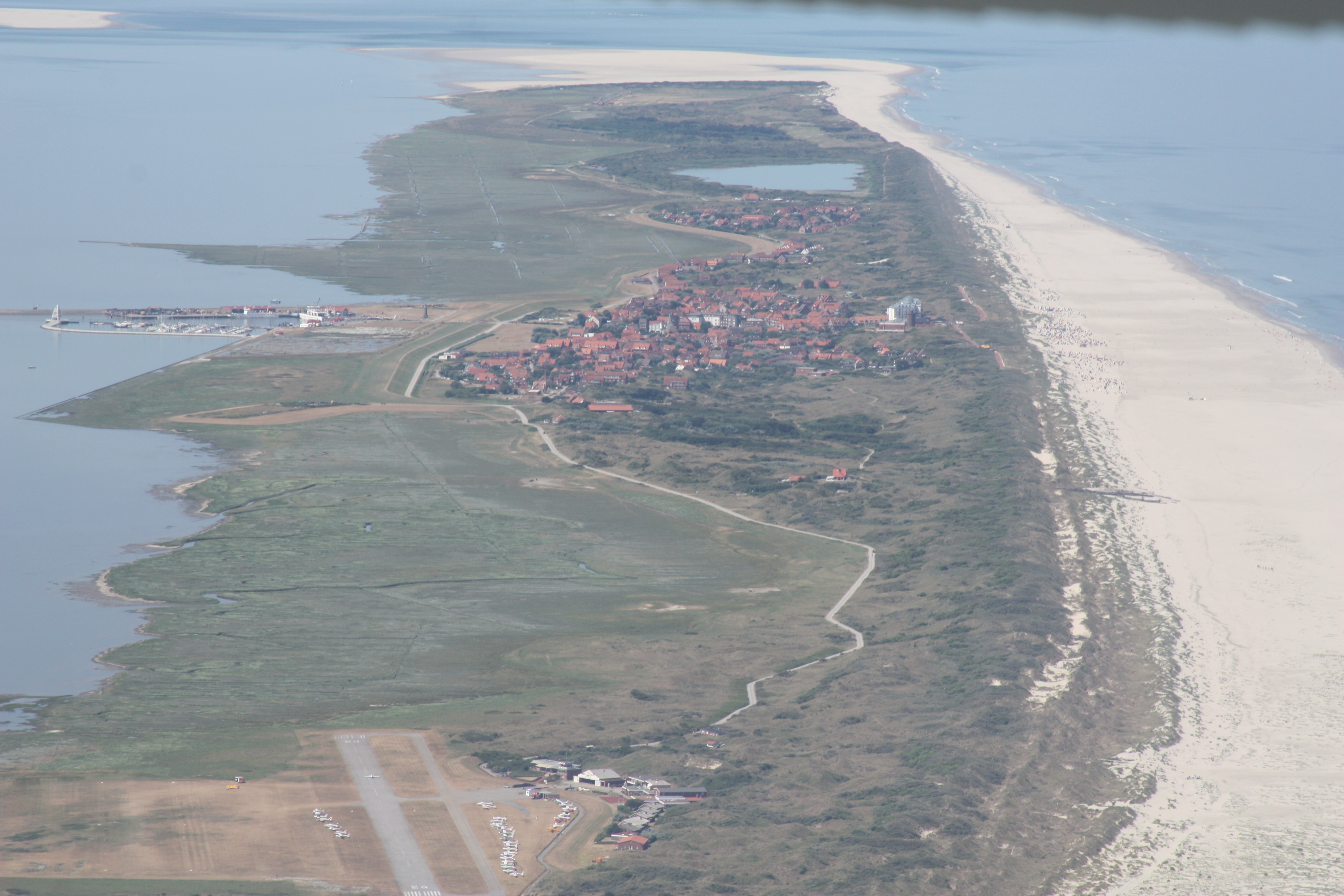 Flug über Juist - von Borkum kommend, zuerst am Nordstran entlang; Flughöhe 500 m = 1500 ft; Juli 2010